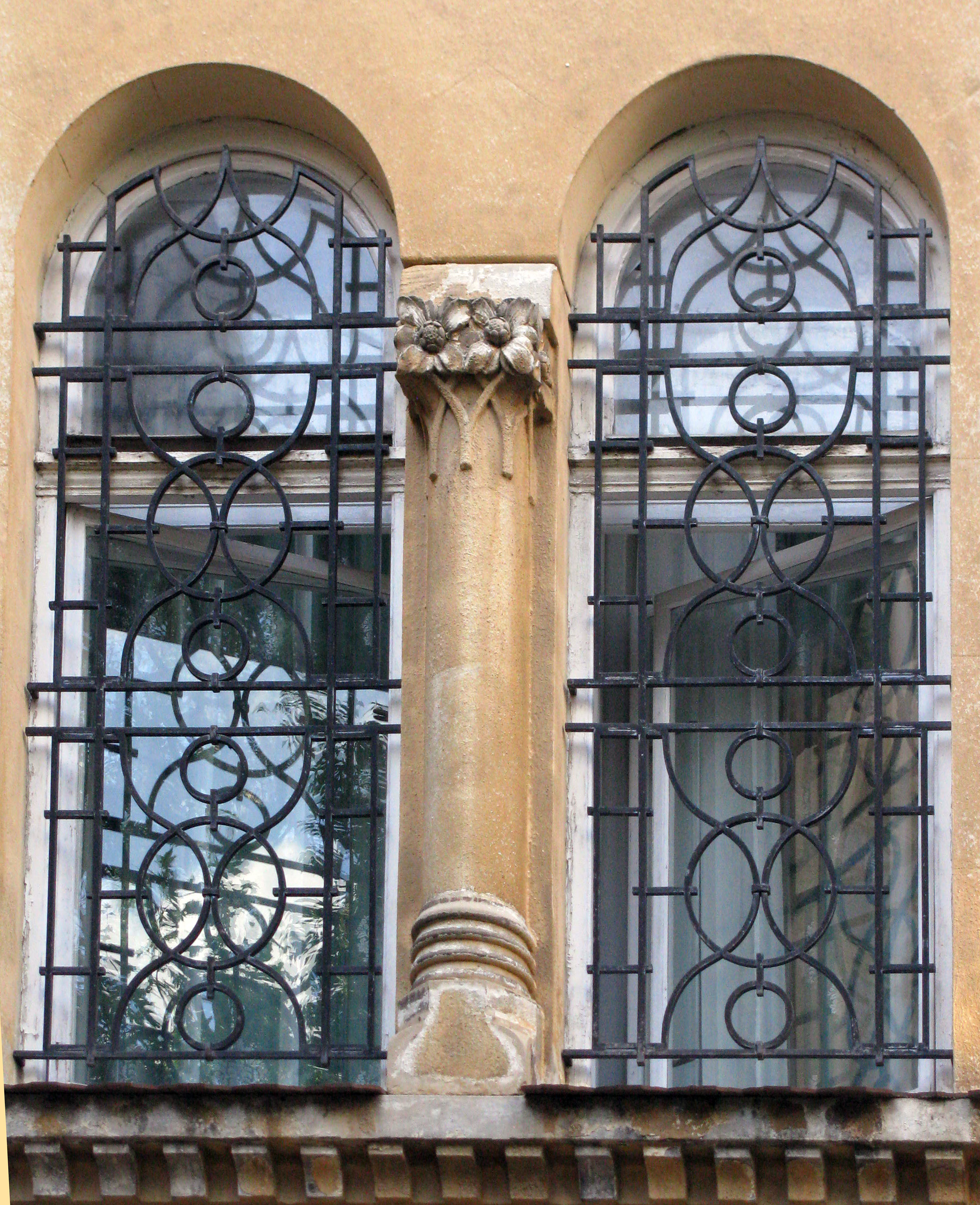 Будинок по вулиці Богомольця, 7 (Львів). Запроектований архітектурно-будівничим бюро Івана Левинського.